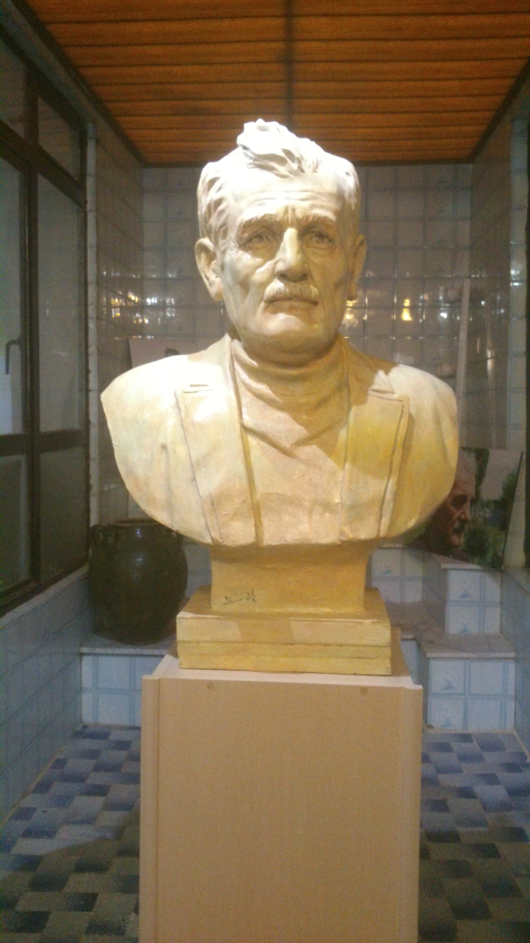 Kurdî: پەیکەرەی مامۆستا هێمن له سەرای هێمن